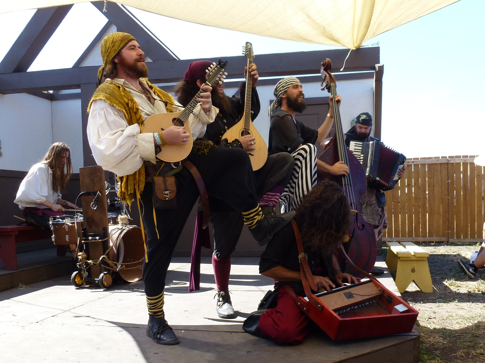 Dread Crew of Oddwood